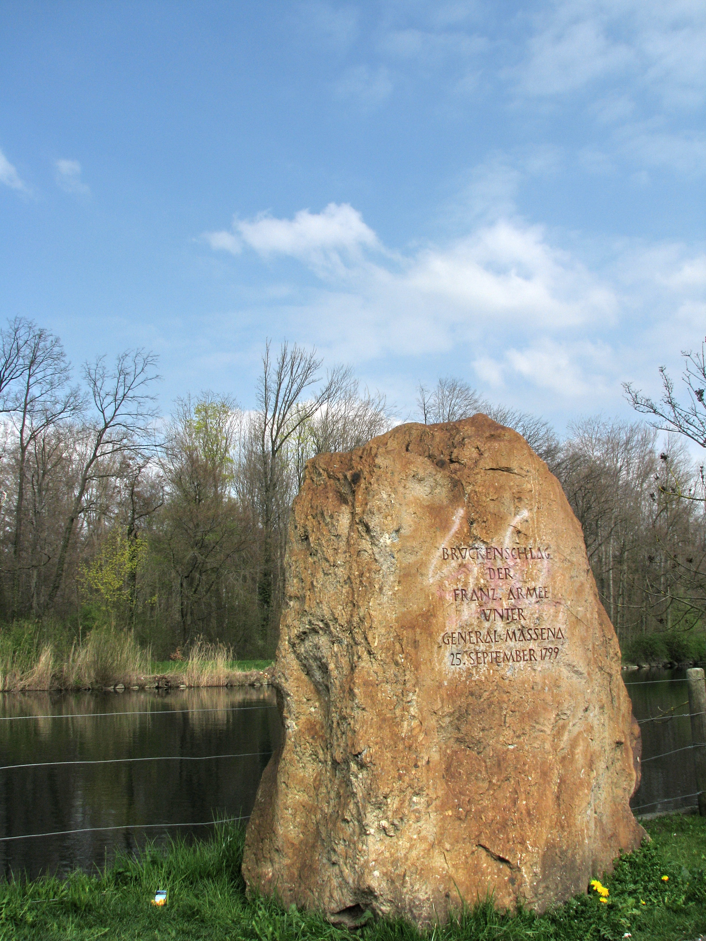 Zweite Schlacht von Zürich an der Limmat bei Dietikon